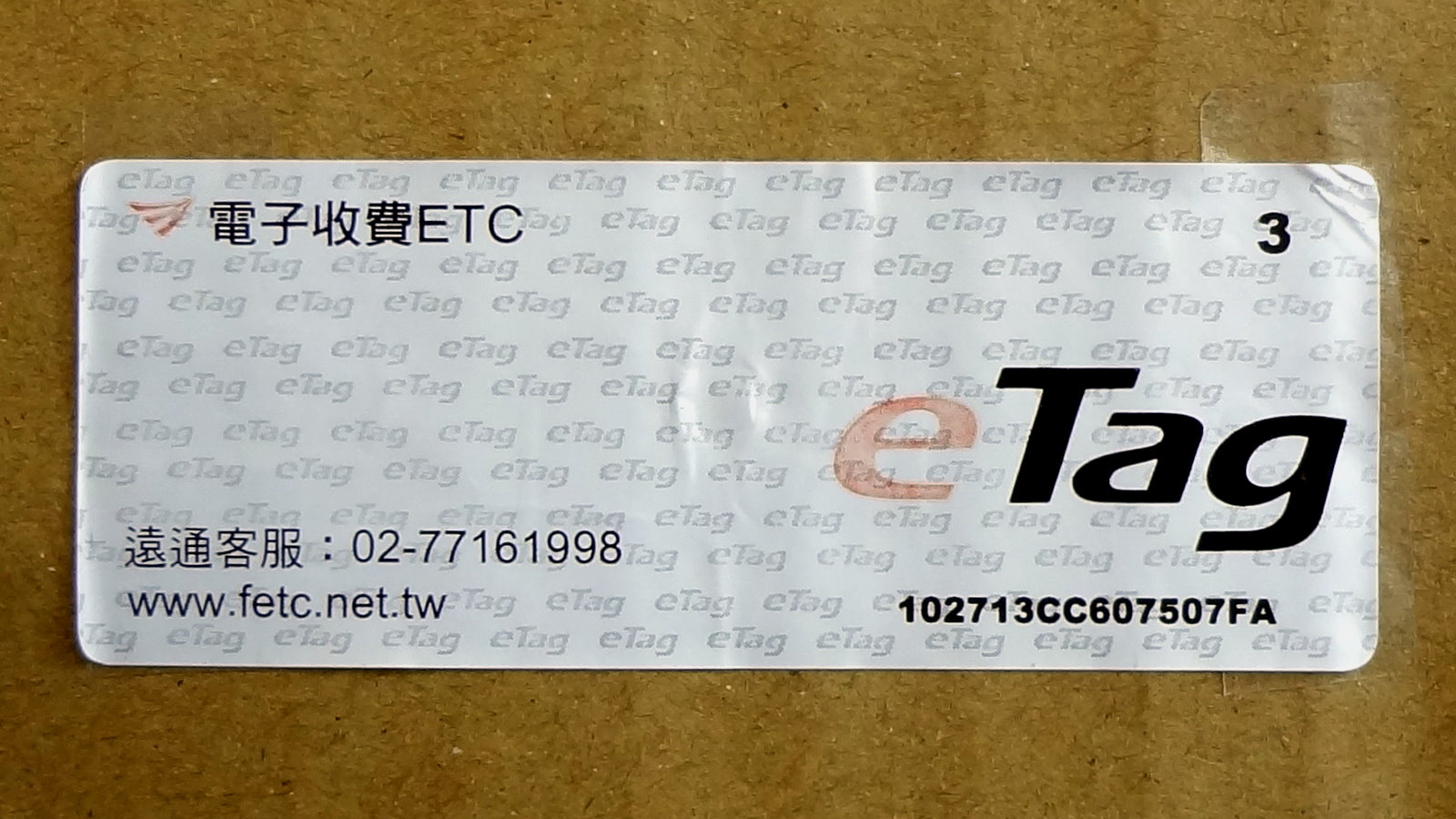 遠通電收eTag前擋玻璃型，編號102713CC607507FA。